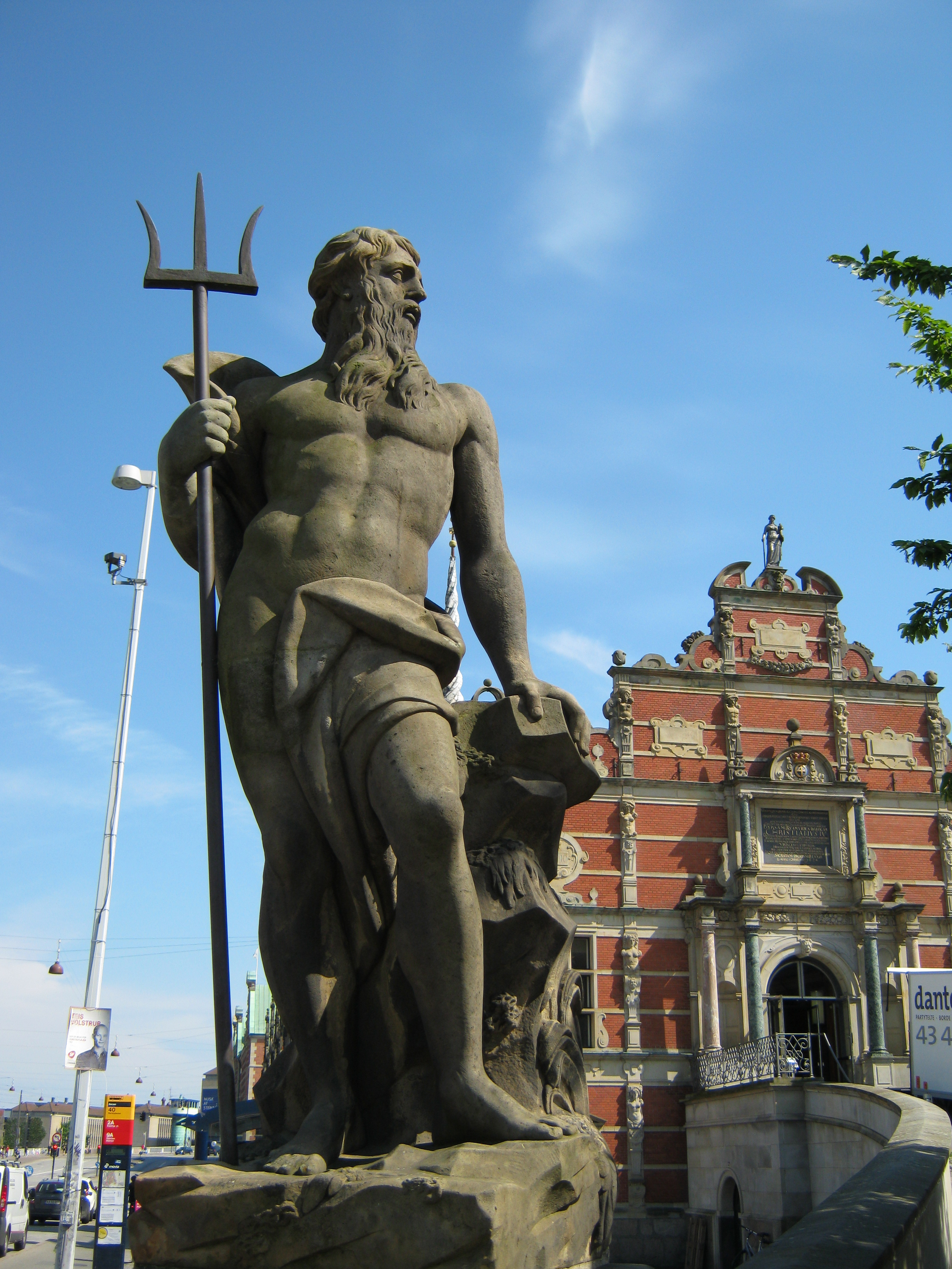 Neptune statue at Børsen in Copenhagen, Denmark